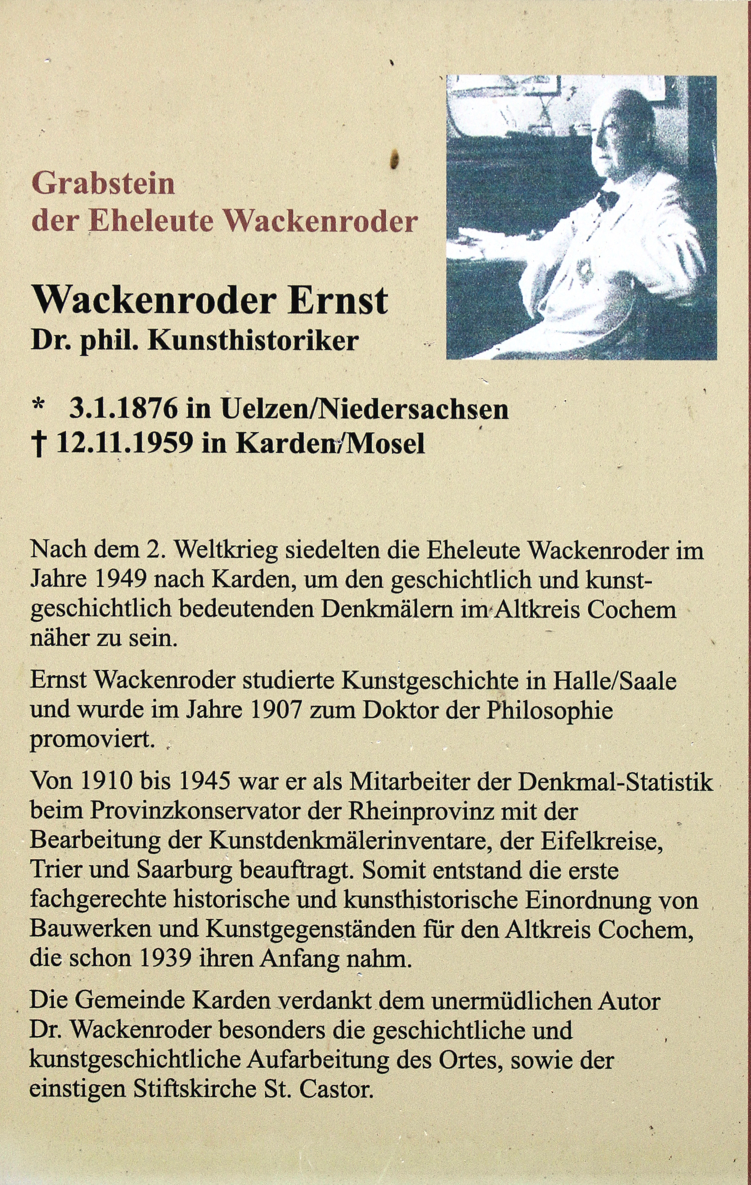 Treis-Karden; Gedenktafel für den Historiker Ernst Wackenroder am alten Kirchturm auf dem Friedhof von Karden. Wackenroder hat sich insbesondere um die Geschichtsschreibung von Karden verdient gemacht.